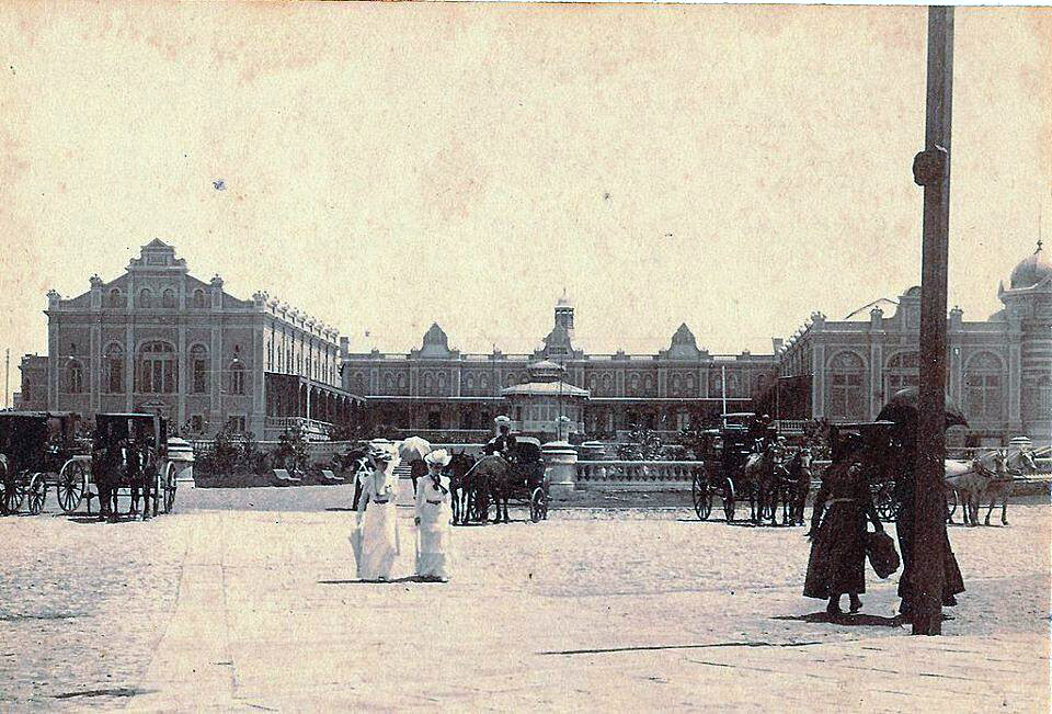 Mar del Plata, Hotel Bristol, fines del siglo XIX. Documento fotográfico. 214343. General Archive of the Nation (Argentina) Native nameArchivo General de la Nación ArgentinaLocationBuenos Aires, ArgentinaEstablished28 August 1821Website control : Q2860529 This file, was provided to Wikimedia Commons thanks to an agreement between the General Archive of the Nation of Argentina and Wikimedia Argentina.